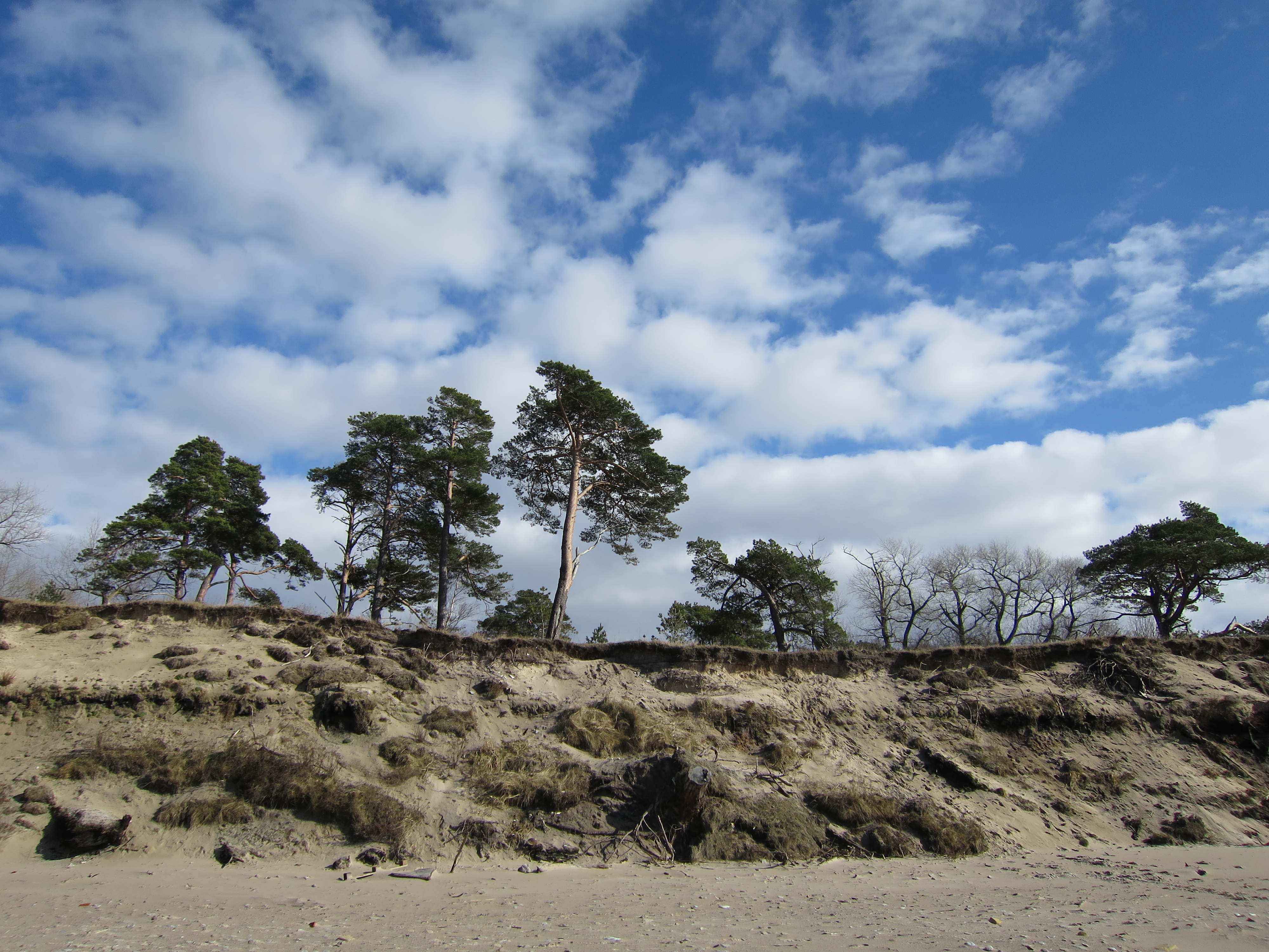 Jūras krasts pie Ziemeļu fortiem Liepājā